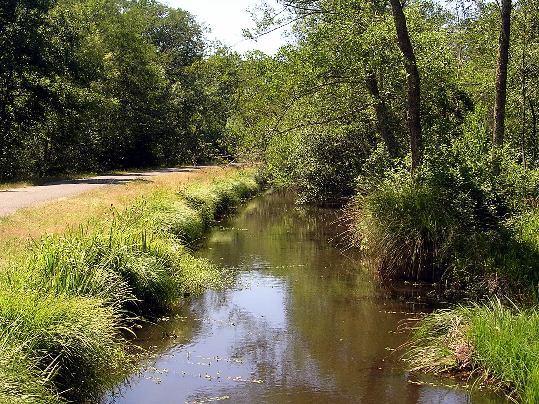 Craste en pays de Born (Landes, France)